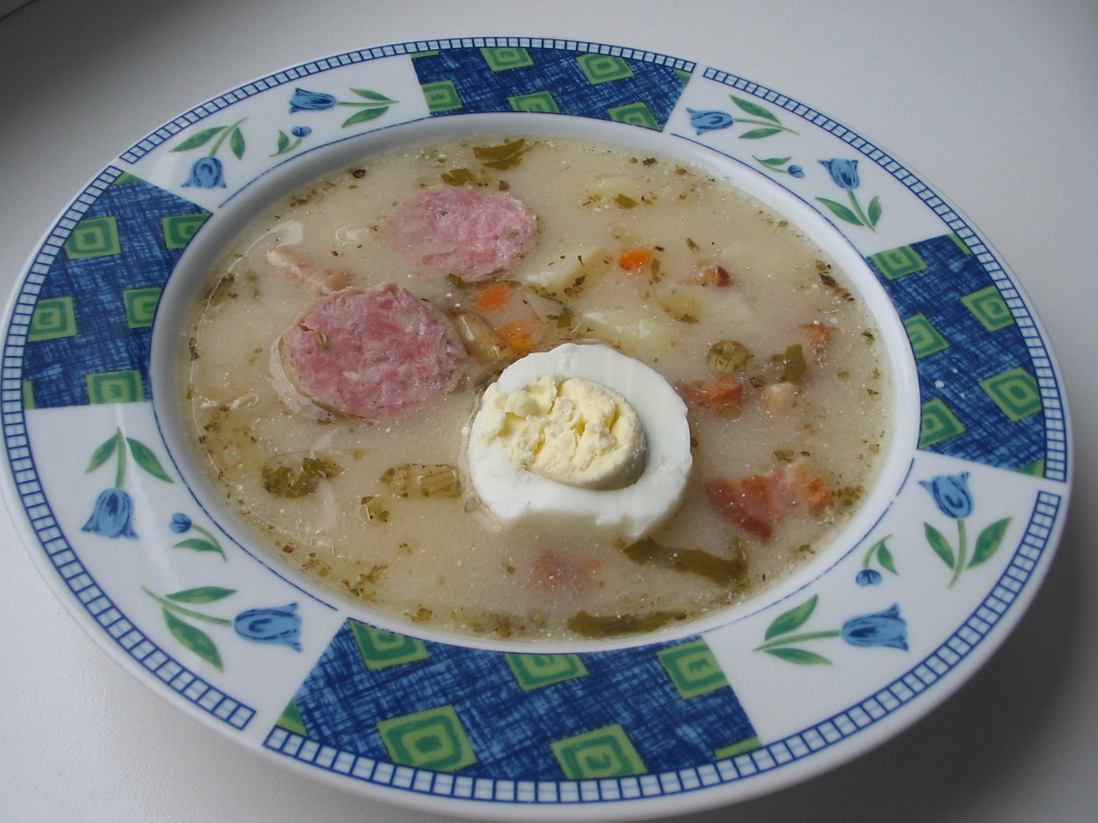 жур (овочевий суп з м'ясом та ковбасою, заправлений хлібним квасом)